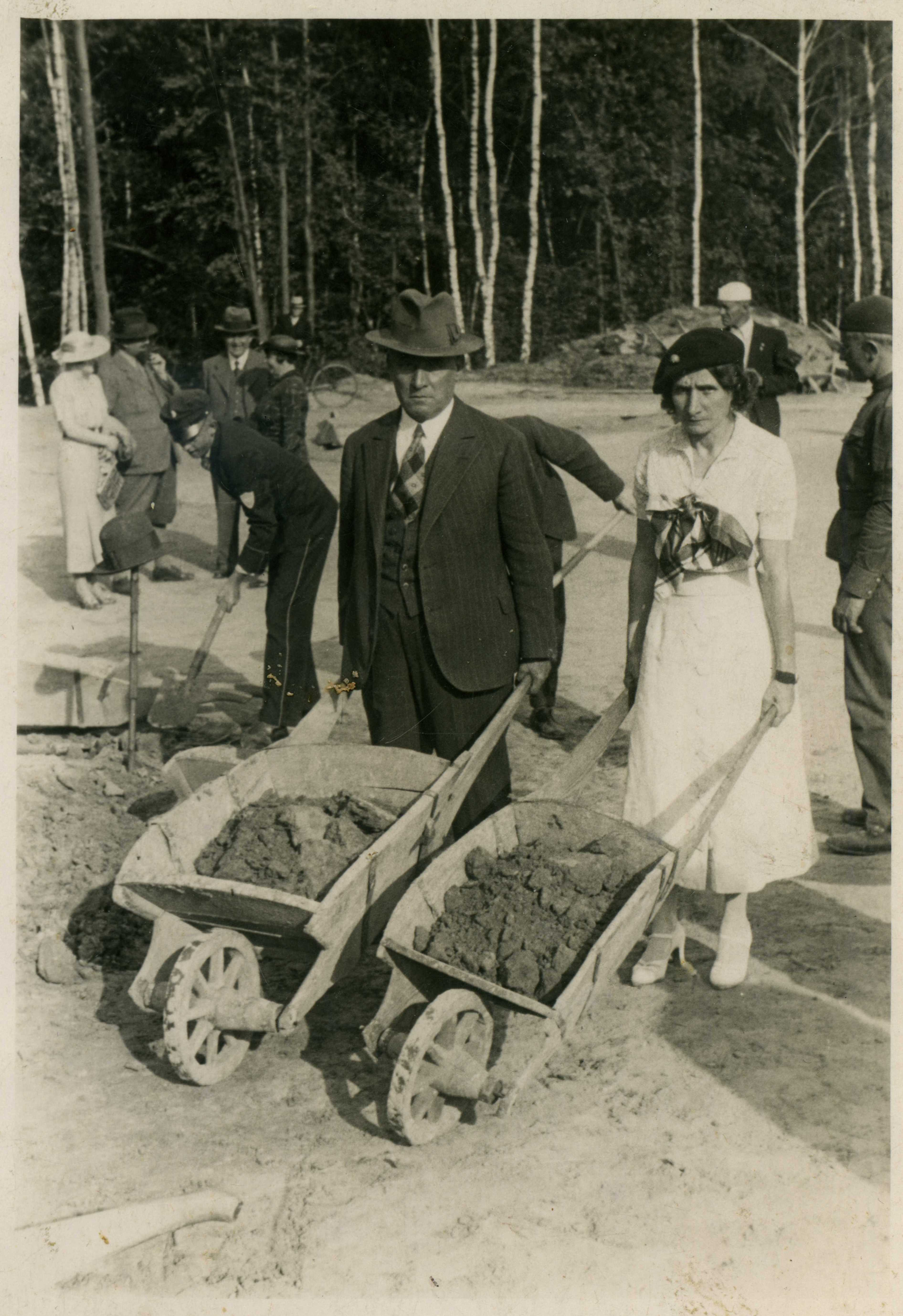 Wincenty Byrski z córką Anną w Krakowie podczas budowy kopca Piłsudskiego (1935)